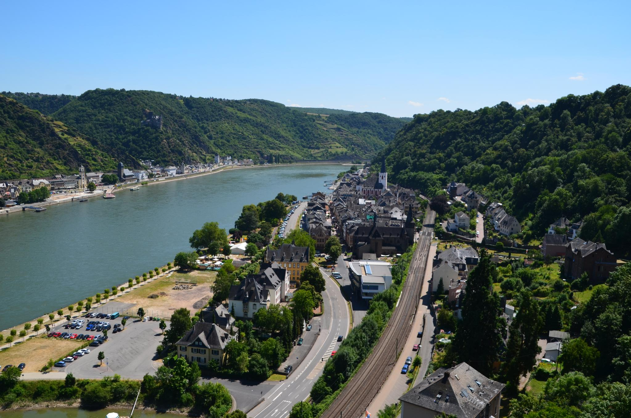 Mittelrhein